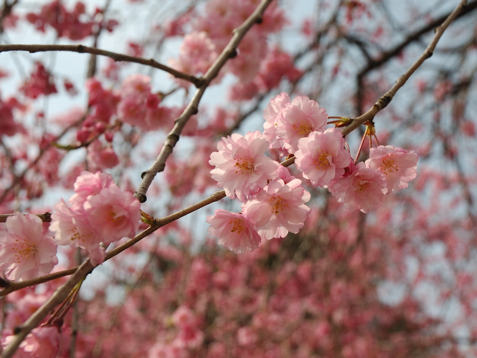 Prunus serrulata (サクラ)